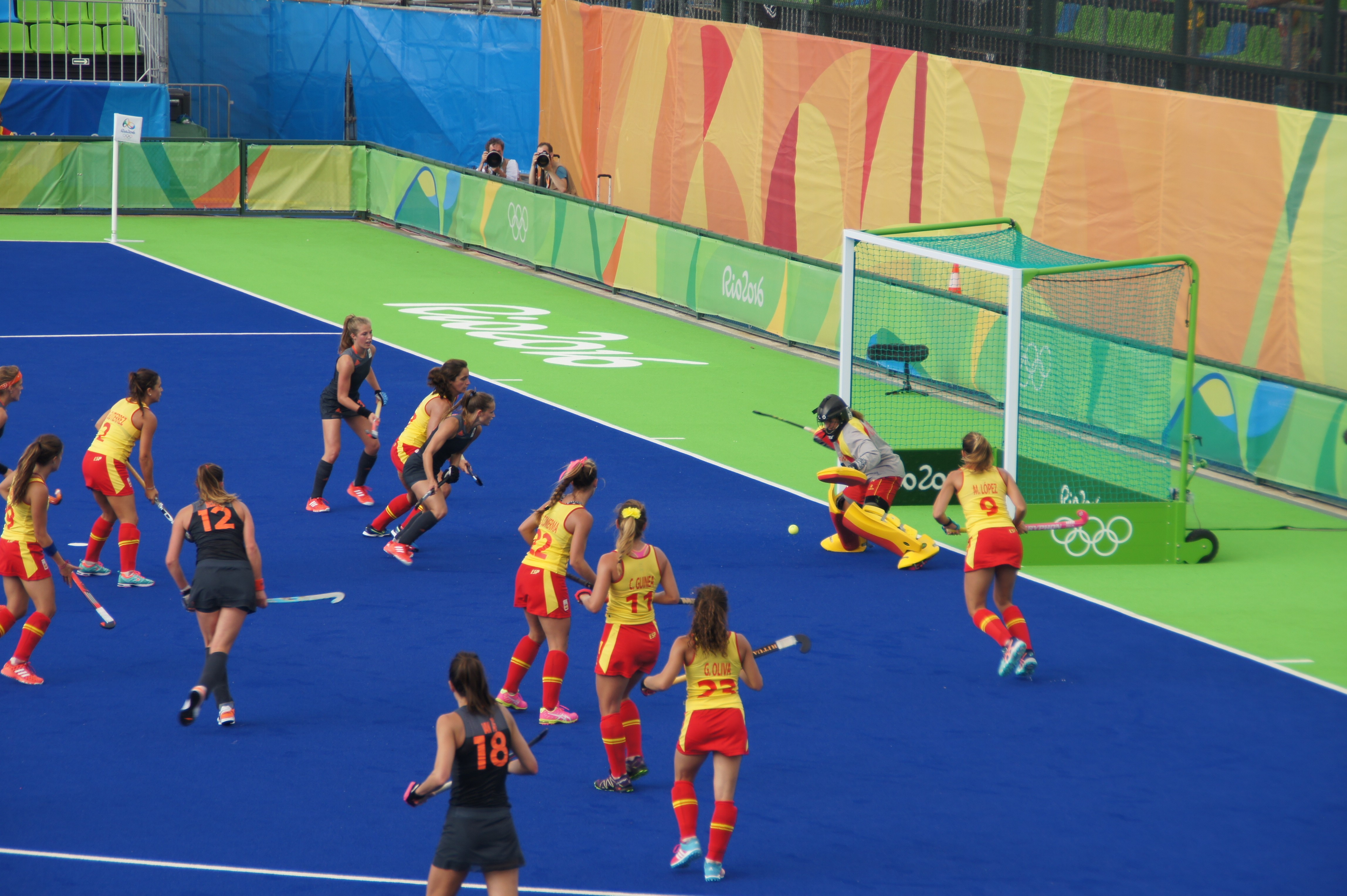 Rio 2016.Hóquei na grama. Feminino. Holanda x Espanha. 61